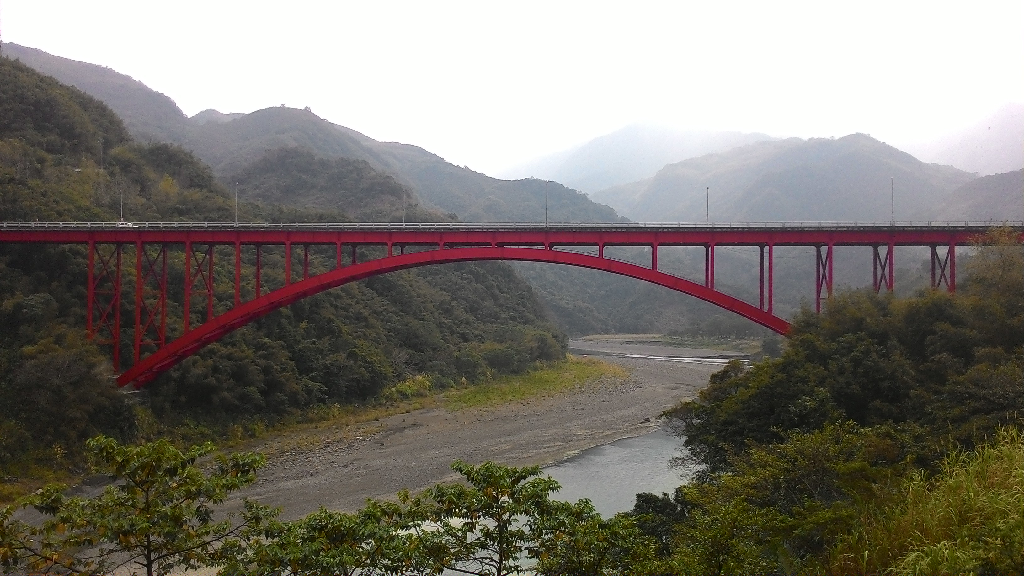 北橫羅浮橋